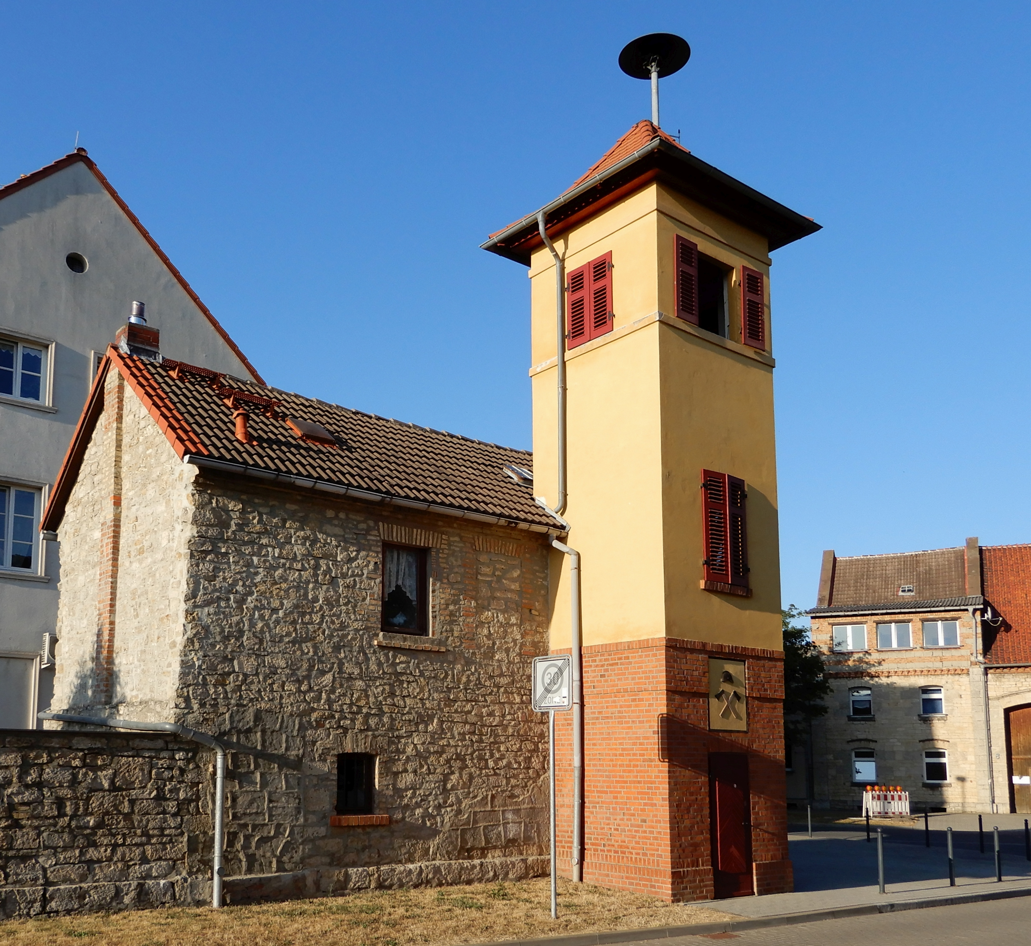 Gatersleben, Lange Straße 45, Spritzenhaus